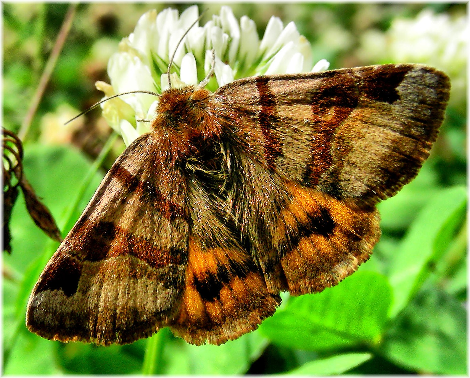 Euclidia glyphica en Ordes (Galiza)